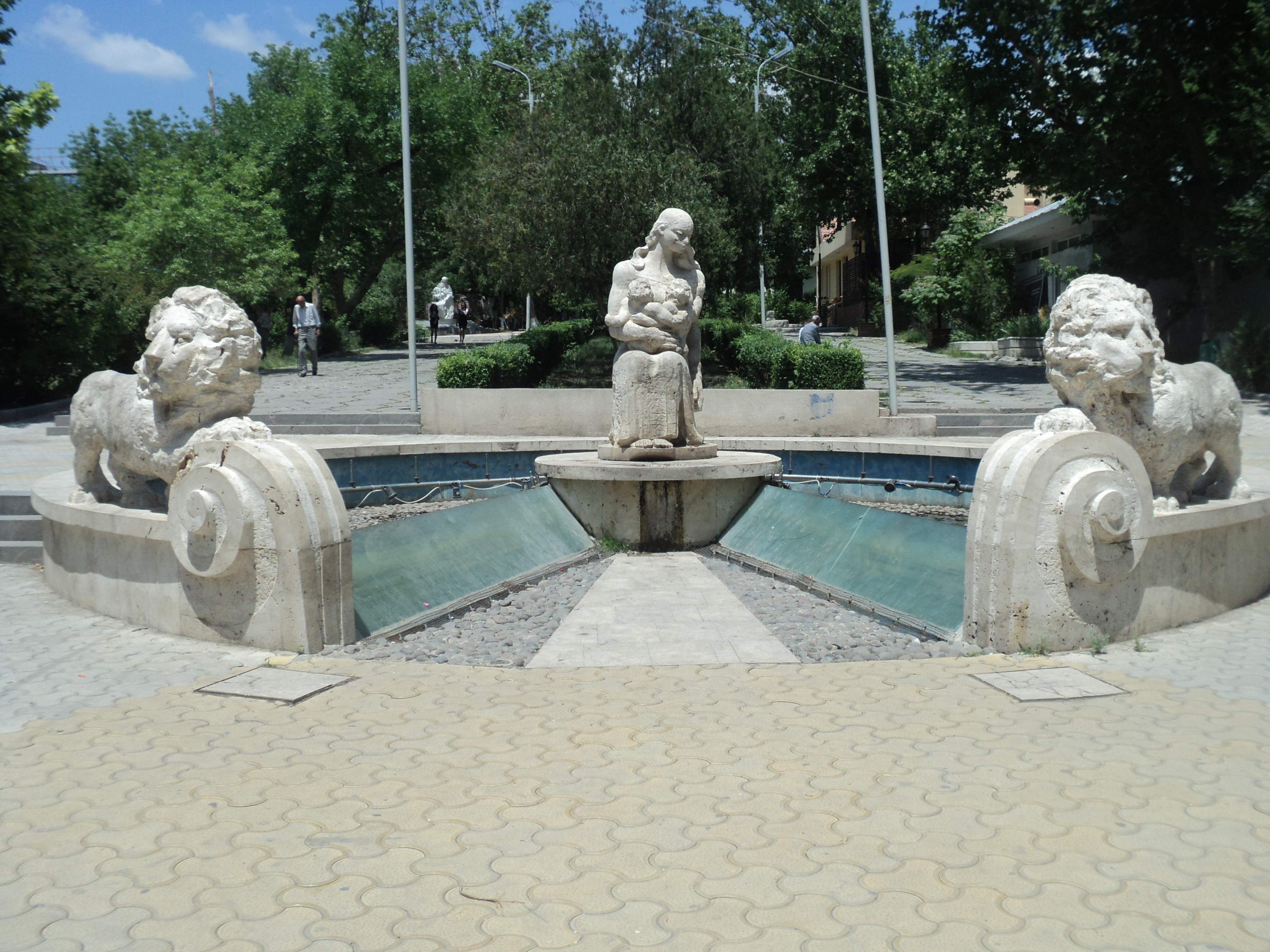 Ծովինար. Սանասարի եւ Բաղդասարի ծնունդը Քանդակագործ` Վիգեն Ավետիս Վահագն Դավթյանի անվան զբոսայգի, 2008 Գտնվում է Արաբկիր համայնքում, Կոմիտաս պողոտայի և Նաիրի Զարյան փողոցի միջև ընգած զբոսայգում, Արաբկիր թաղապետարանի մոտ 3/7